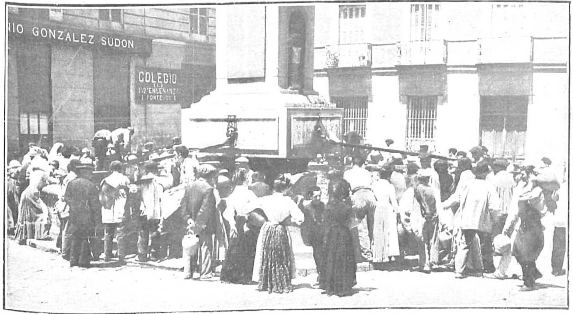 Fotos de varias fuentes de Madrid.